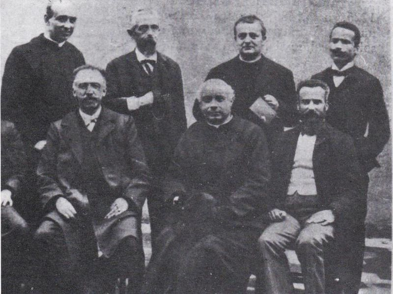 La presidenza del II gruppo generale dell'Opera dei Congressi. Seduti da sinistra: Stanislao Medolago Albani, Giorgio Gusmini, Giovanni Grosoli. In piedi: G. Daelli, Giuseppe Toniolo, G. Faraoni e Archimede Pasquinelli.